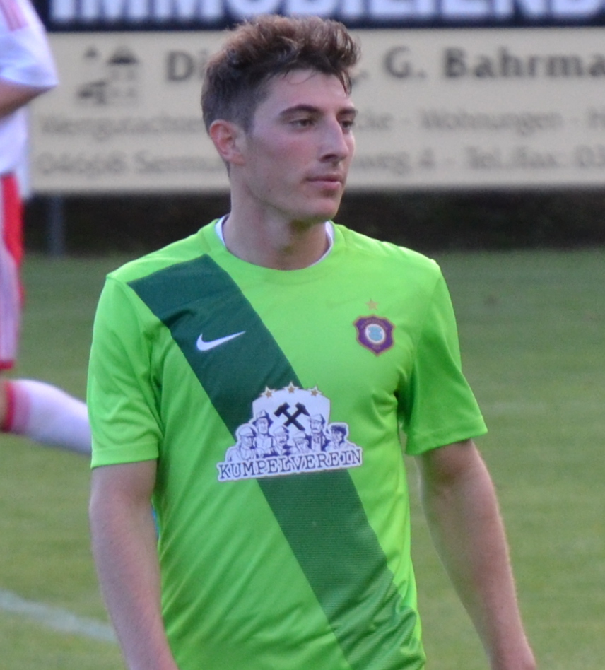 Mario Kvesic beim Freundschaftsspiel von Erzgebirge Aue beim HFC Colditz im Juni 2016